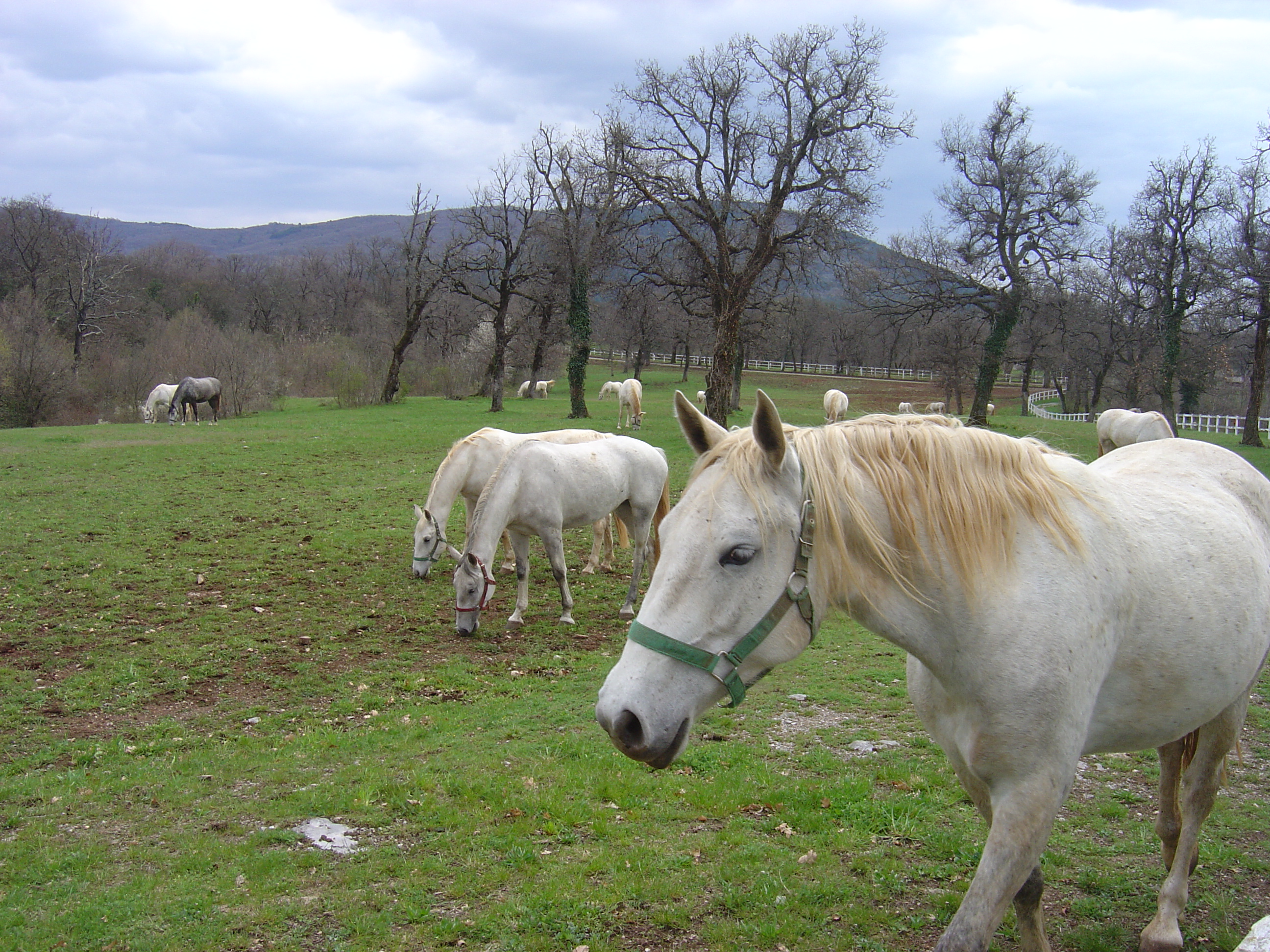 Lipica, Sežana, Slovenia